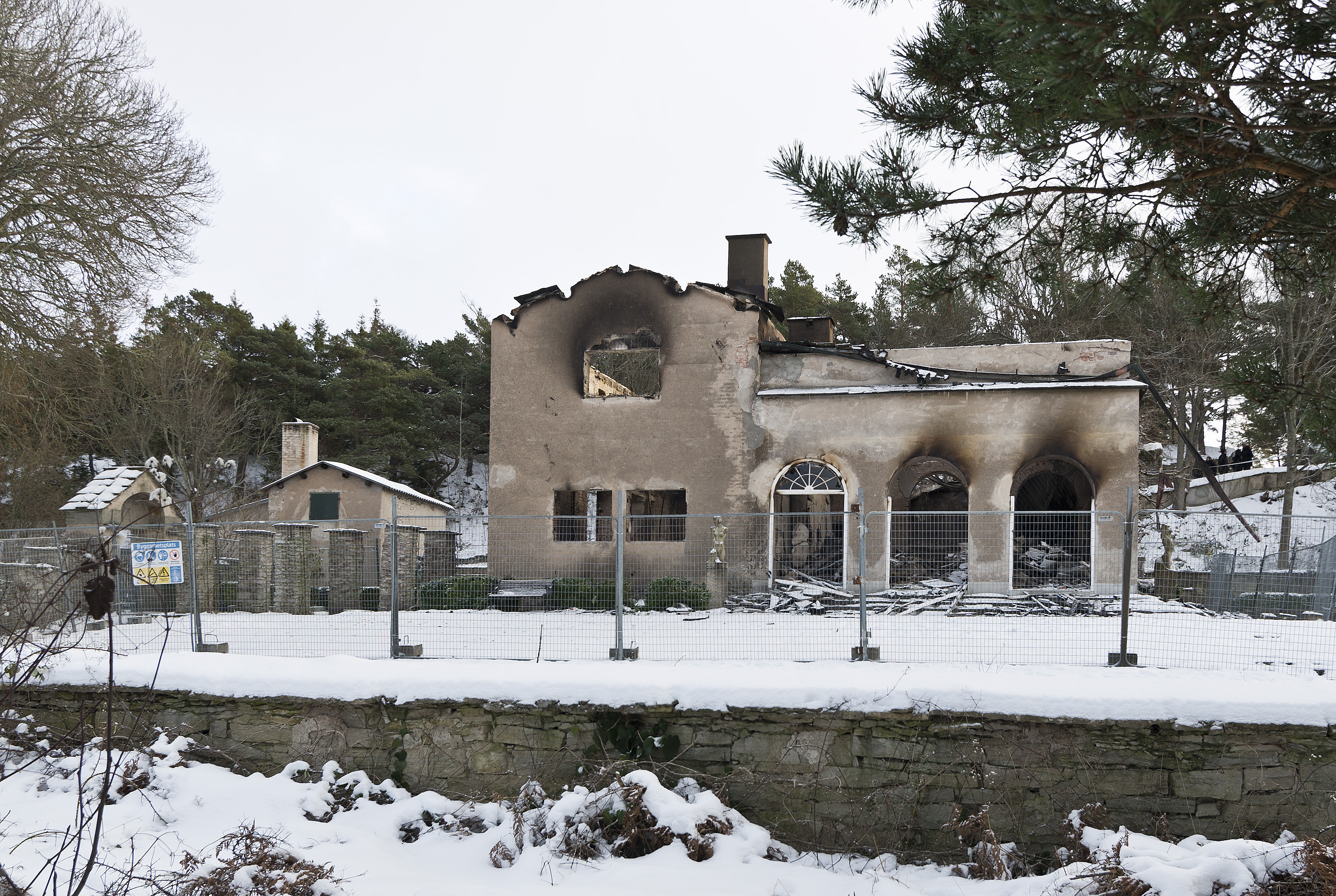 Nedbränd